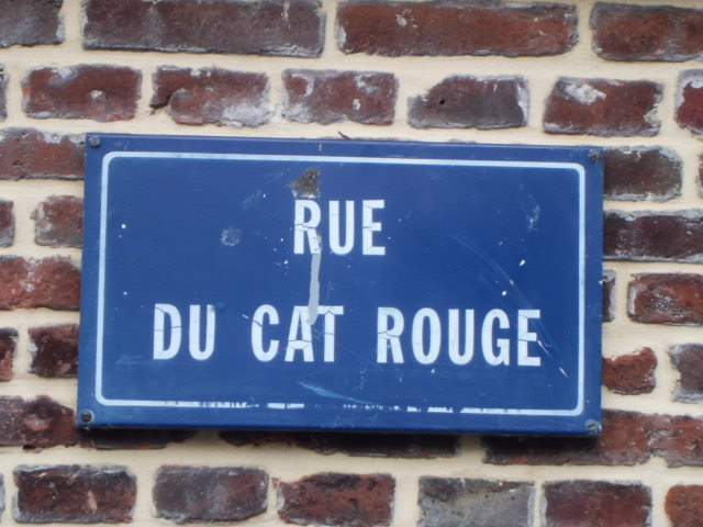 Carouge